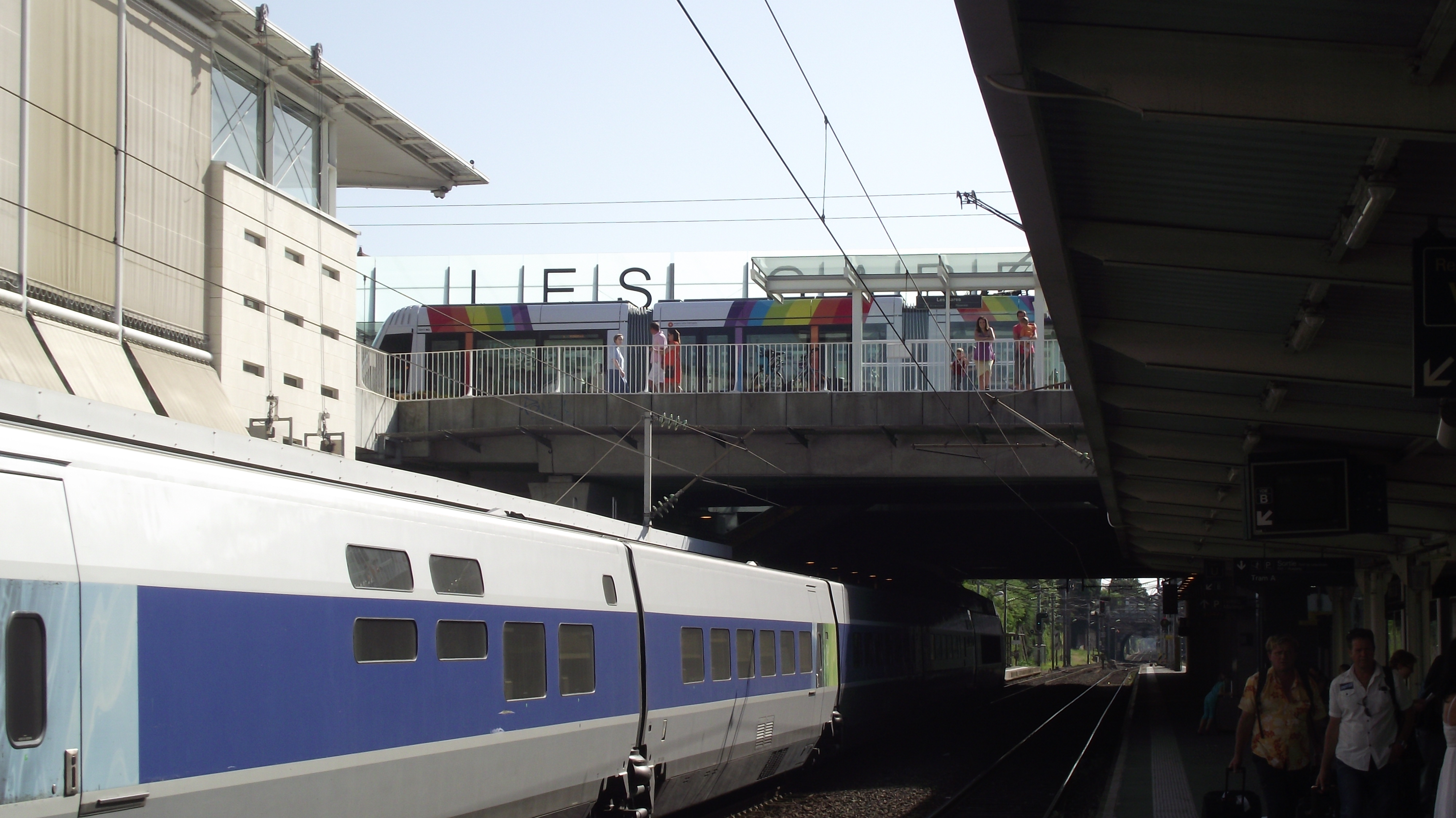 TGV Atlantique naar Parijs en tram